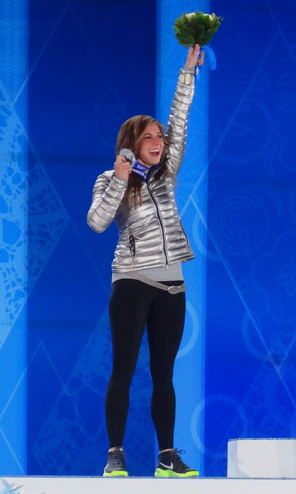 Ноэль Пайкус-Пейс (англ. Noelle Pikus-Pace, 8 декабря 1982, Орем, Юта) — американская скелетонистка, двукратная чемпионка мира (2007 — личное первенство, 2013 — командное). Она завоевала пять медалей на чемпионате мира FIBT, обладательница Кубка мира. Участвовала в зимних Олимпийских играх 2010 года в Ванкувере и завоевала серебряную медаль на Зимних Олимпийских играх 2014 года в Сочи.